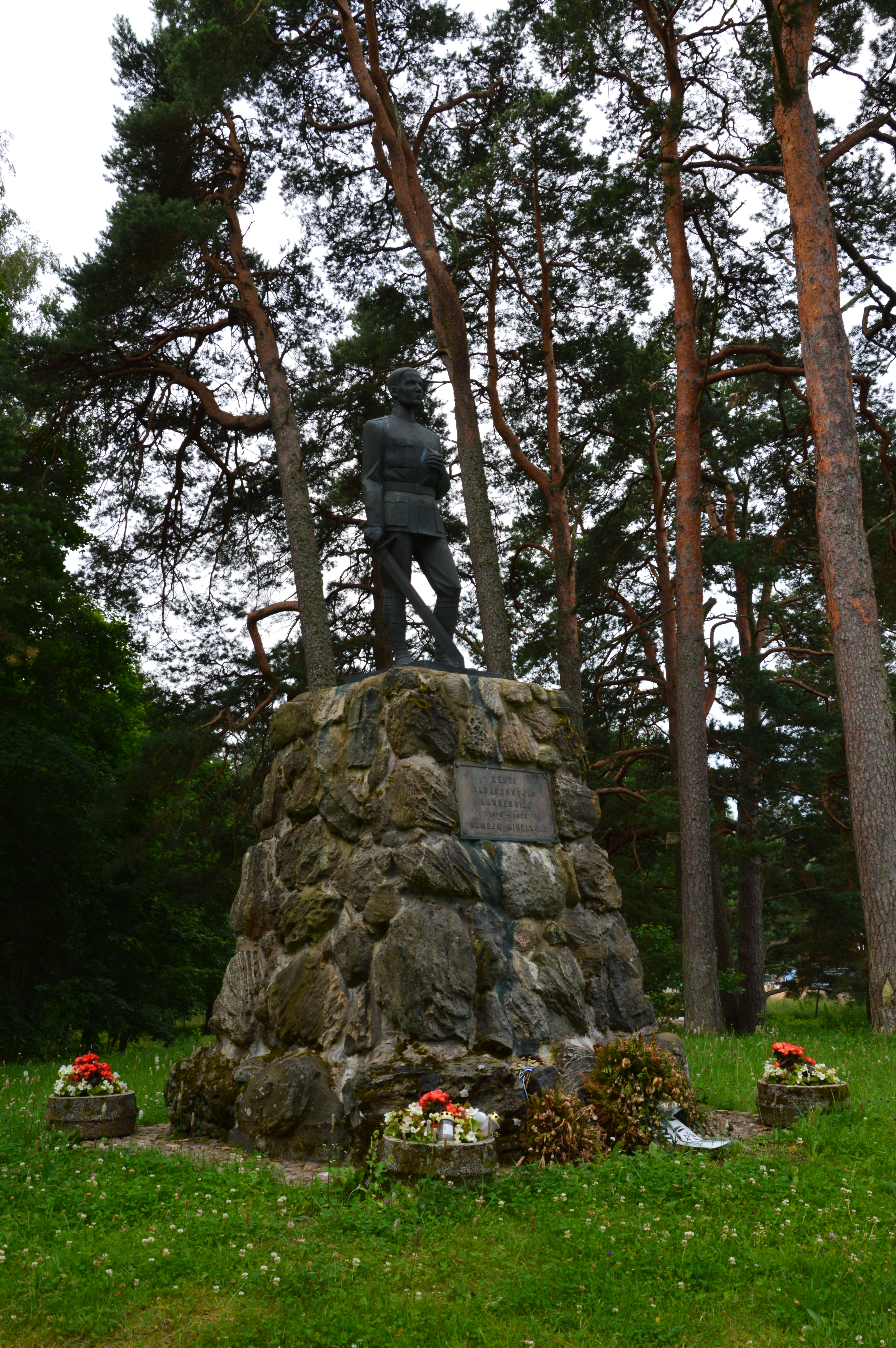 Vabadussõja mälestussammas Kambjas